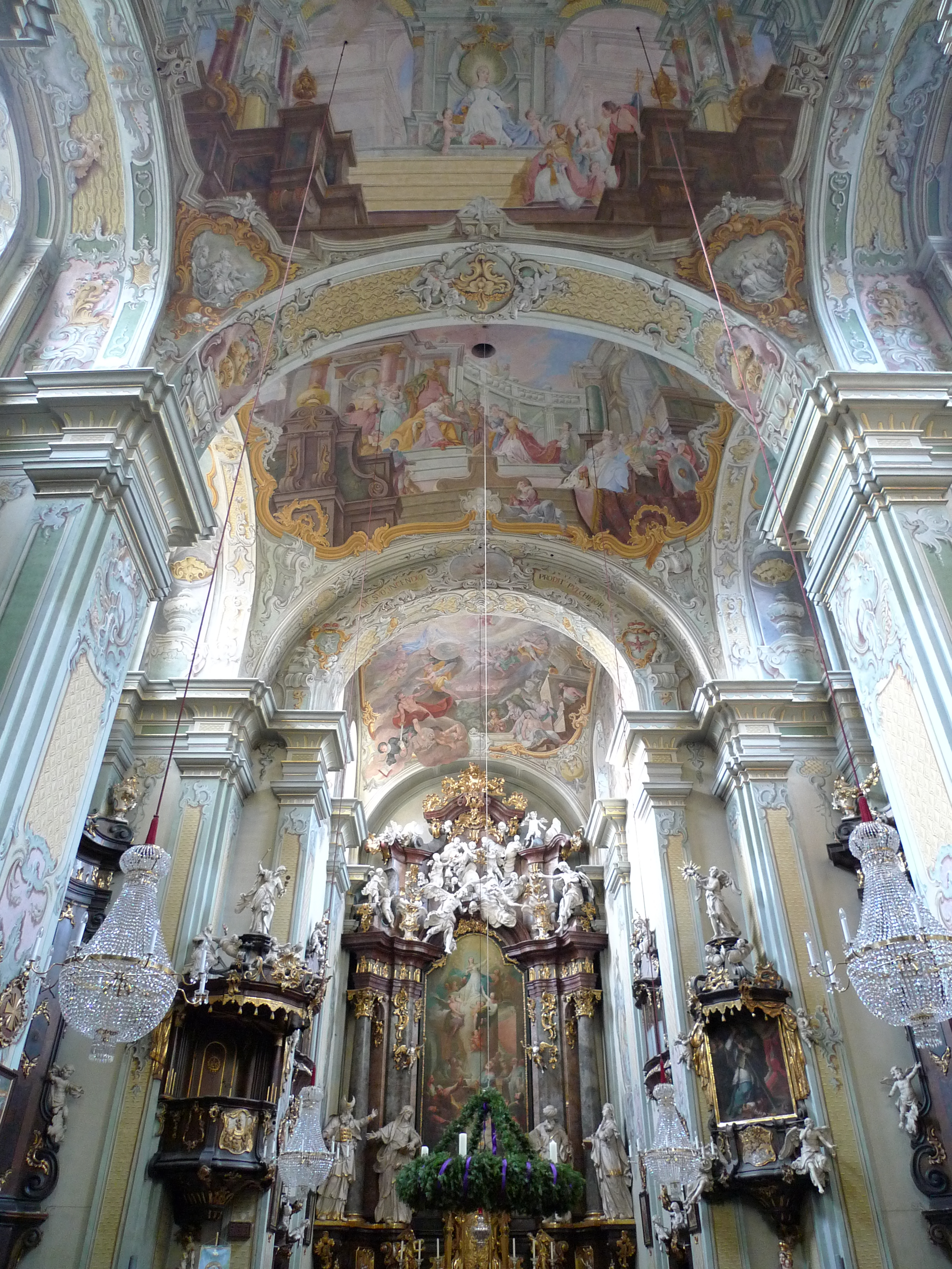 Kath. Pfarrkirche (ehem. Servitenkirche) Mariä Himmelfahrt